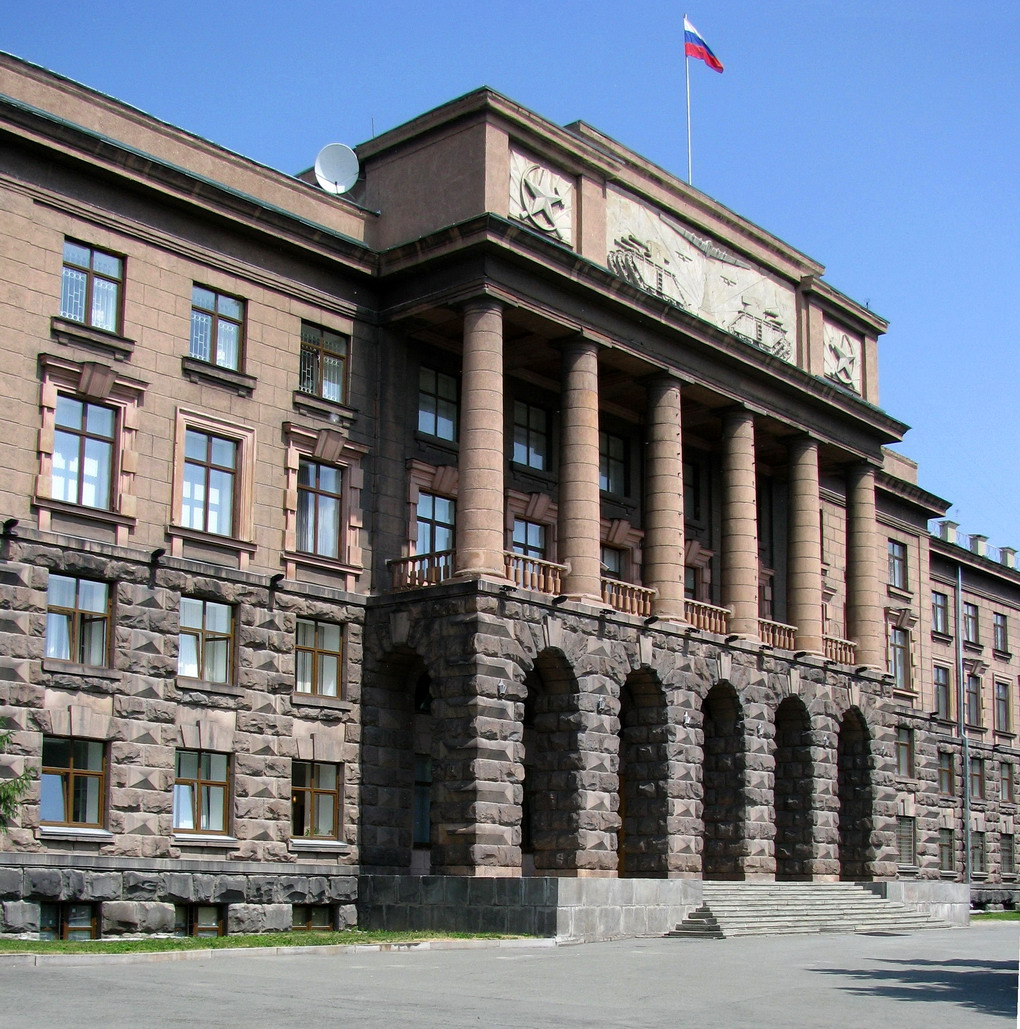 Штаб Приволжско-Уральского военного округа в Екатеринбурге.